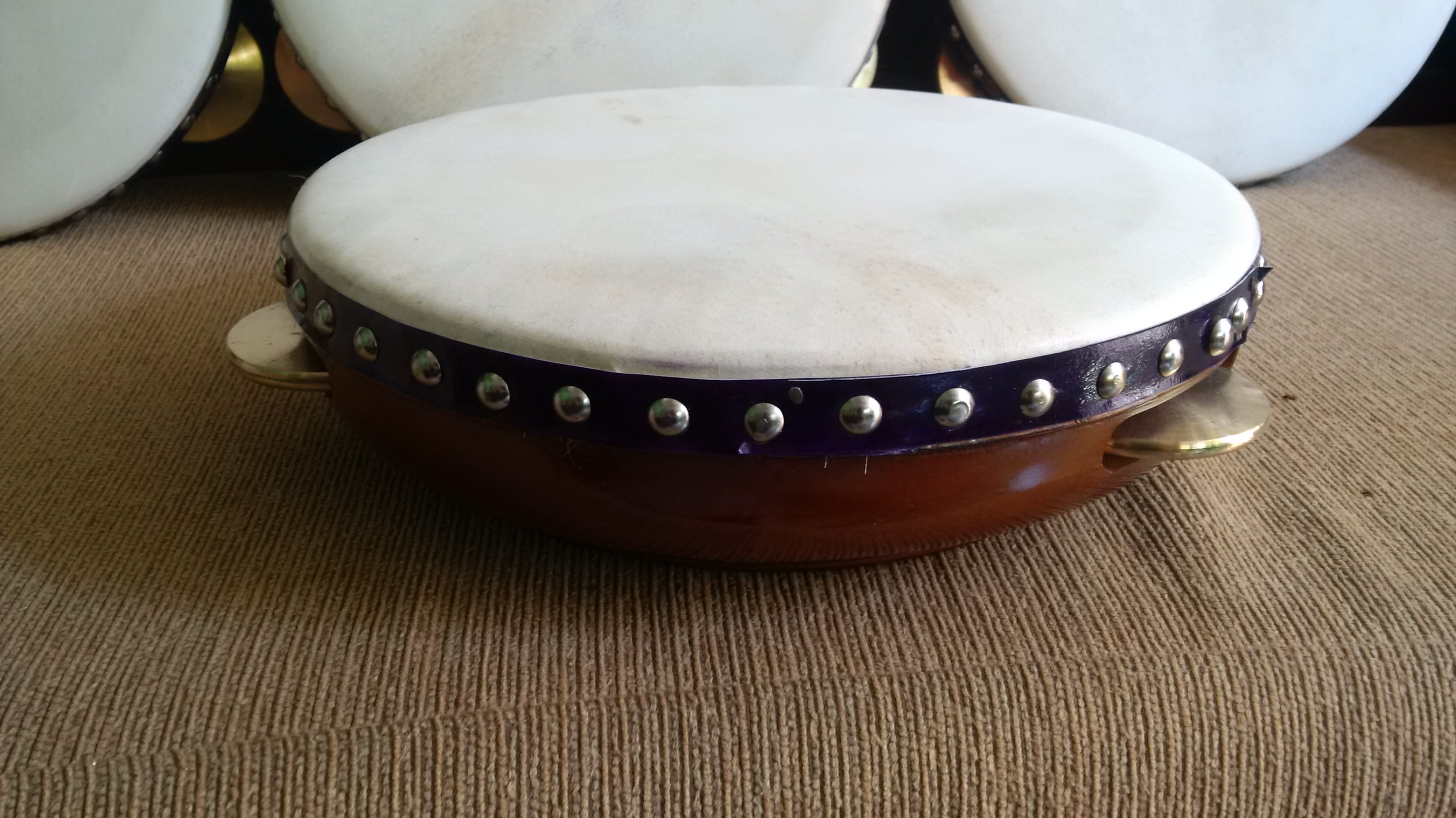 Rebana Hadroh